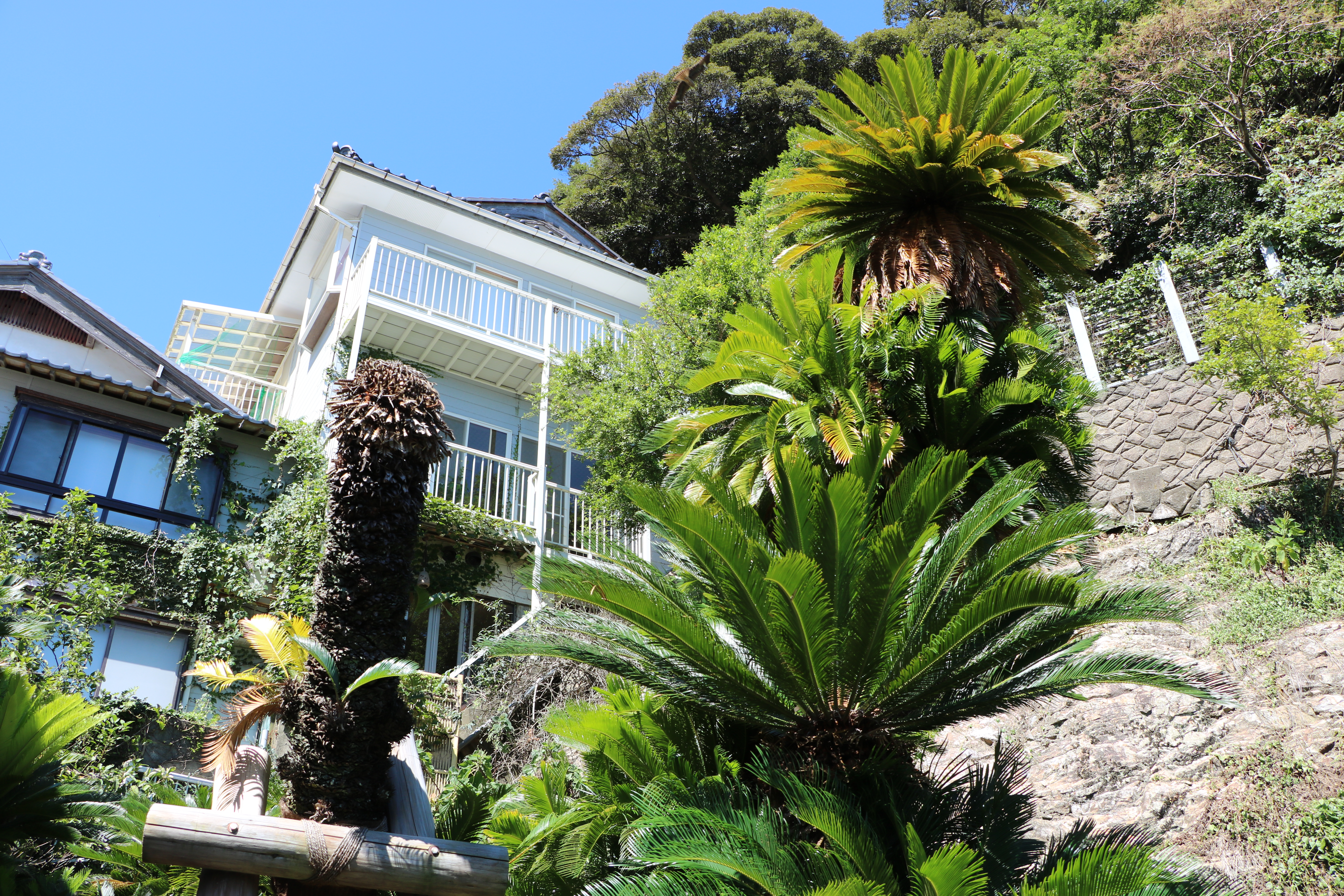 常神のソテツ（国指定天然記念物、福井県三方上中郡若狭町）